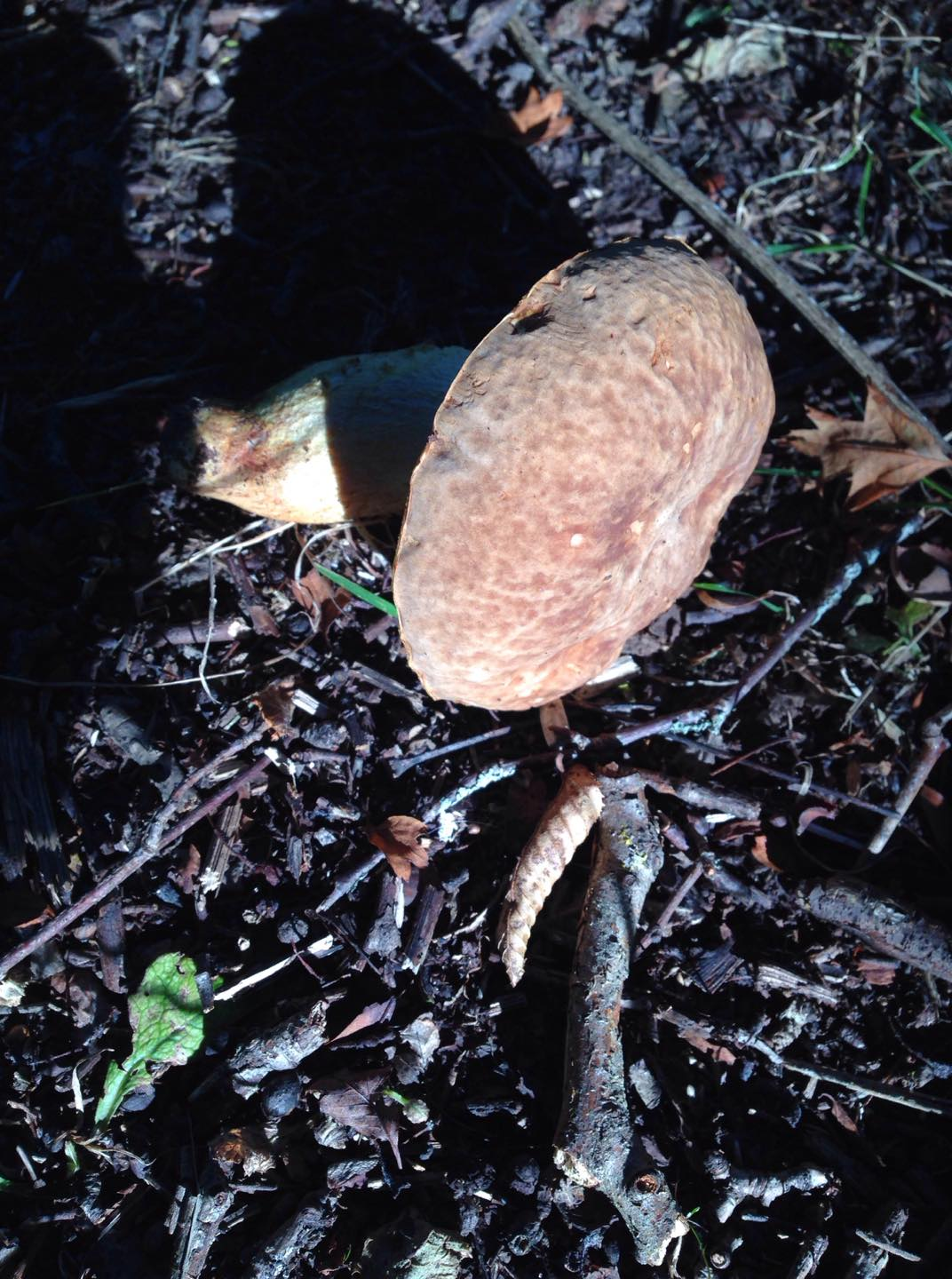 Fungo, Appennino Romagnolo, 700 m.s.l., Bosco di Noccioli, Biancospini, Sanguinelle.